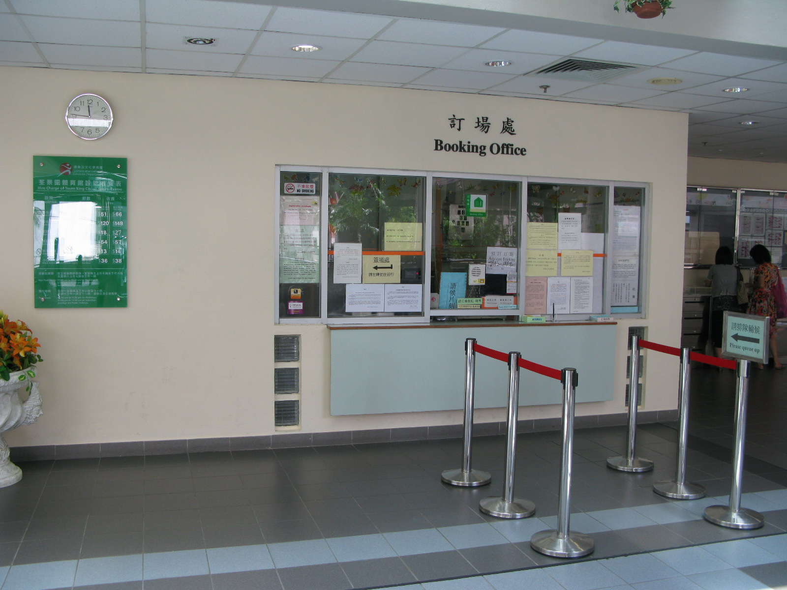 中文（香港）: 香港荃灣荃景圍體育館場務辦事處及訂場處